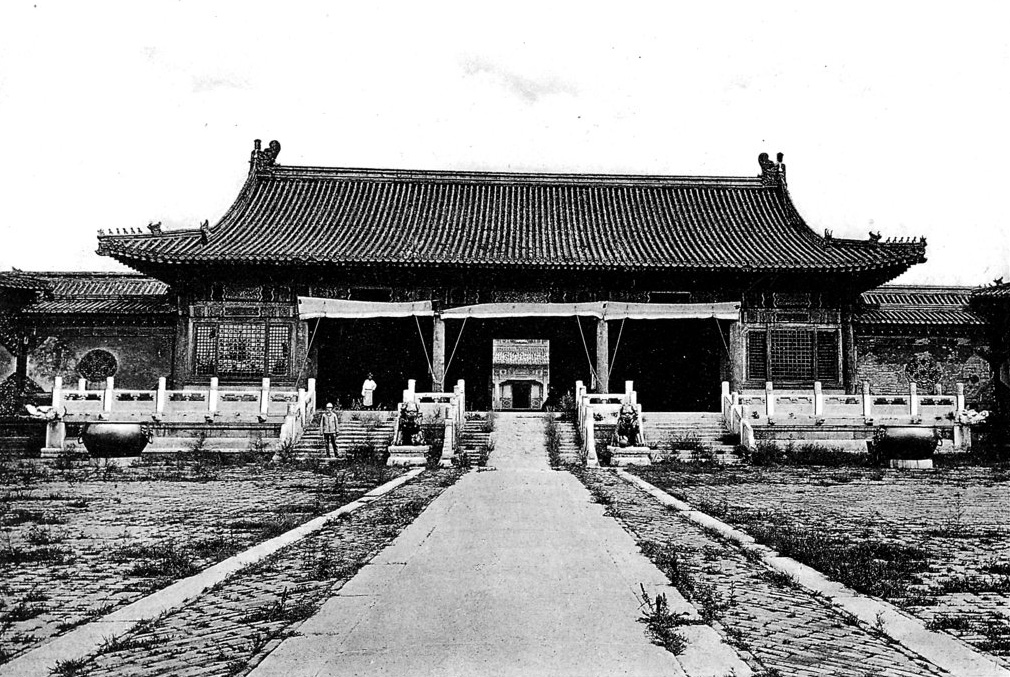 photo from Ein Tagebuch in Bildern